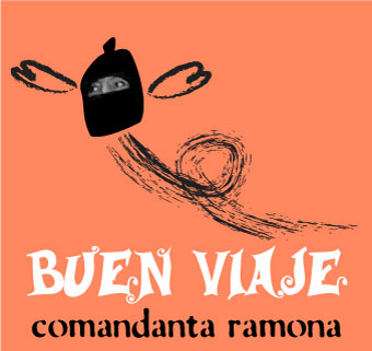 la comandanta ramona del ezln se fue de viaje